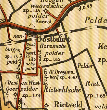 Oostbuurtse polder